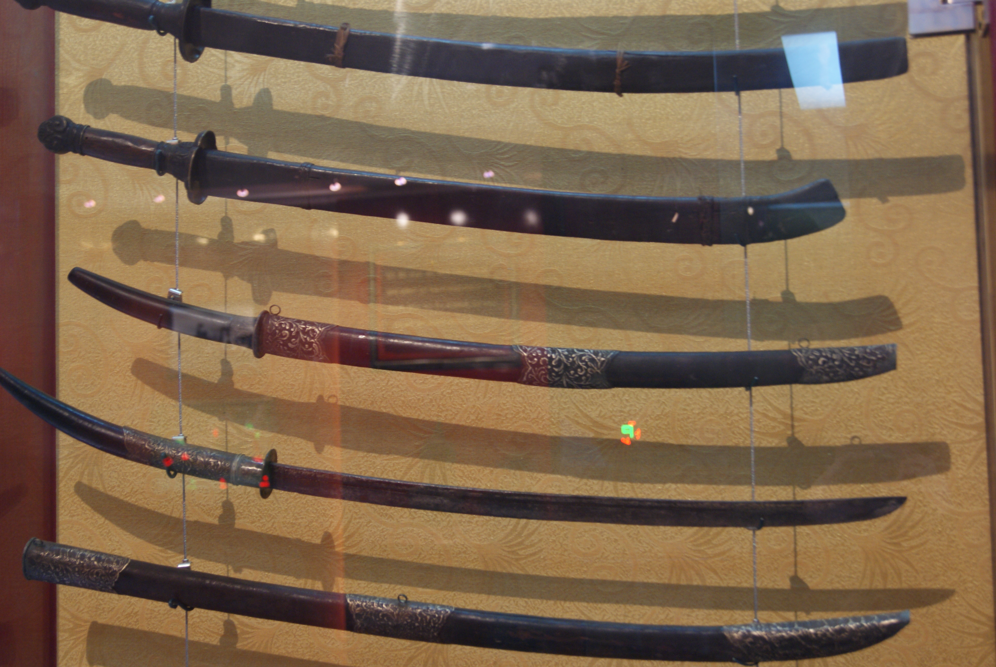 == Giấy phép ==